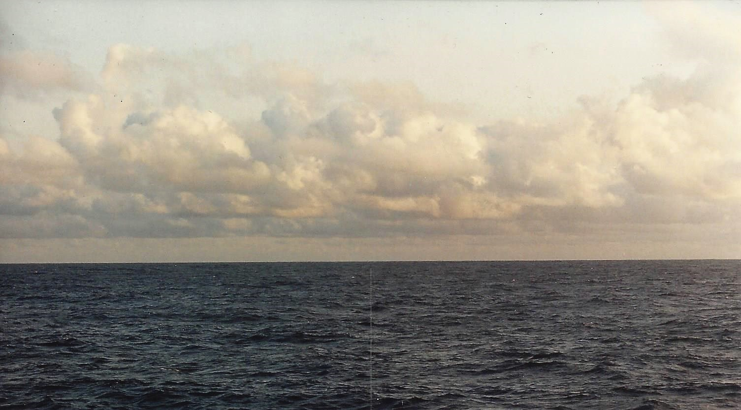 Atlantik auf dem Äquator, 31° 45' westlicher Länge, fotografiert von Fregatte Emden (F 210). Blick nach Westen.